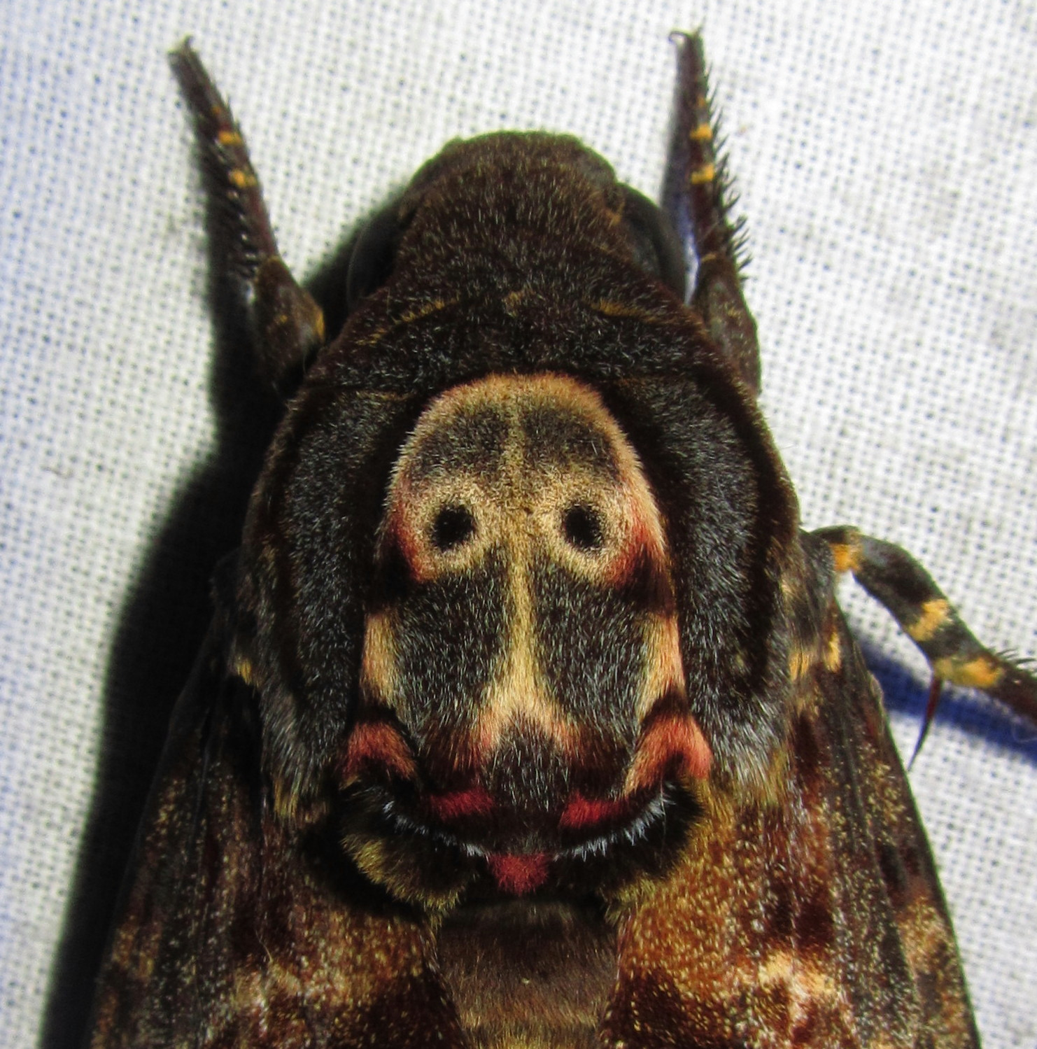 Langka, near Pakke Tiger Reserve, East Kameng, Arunachal Pradesh 13/04/2012 Acherontia lachesis (Fabricius, 1798)